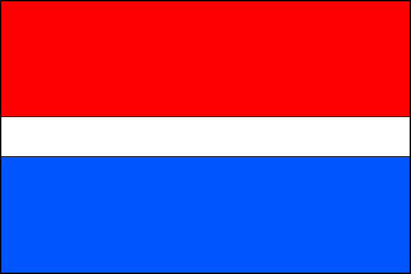 vlajka, Vír, okres Žďár nad Sázavou